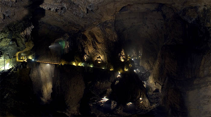 Foto: Boštjan Burger, september 2006 (slikano z dovoljenjem Uprave Regijskega parka Škojanske jame). Slika predstavlja podzemni kanjon: Šumečo jamo